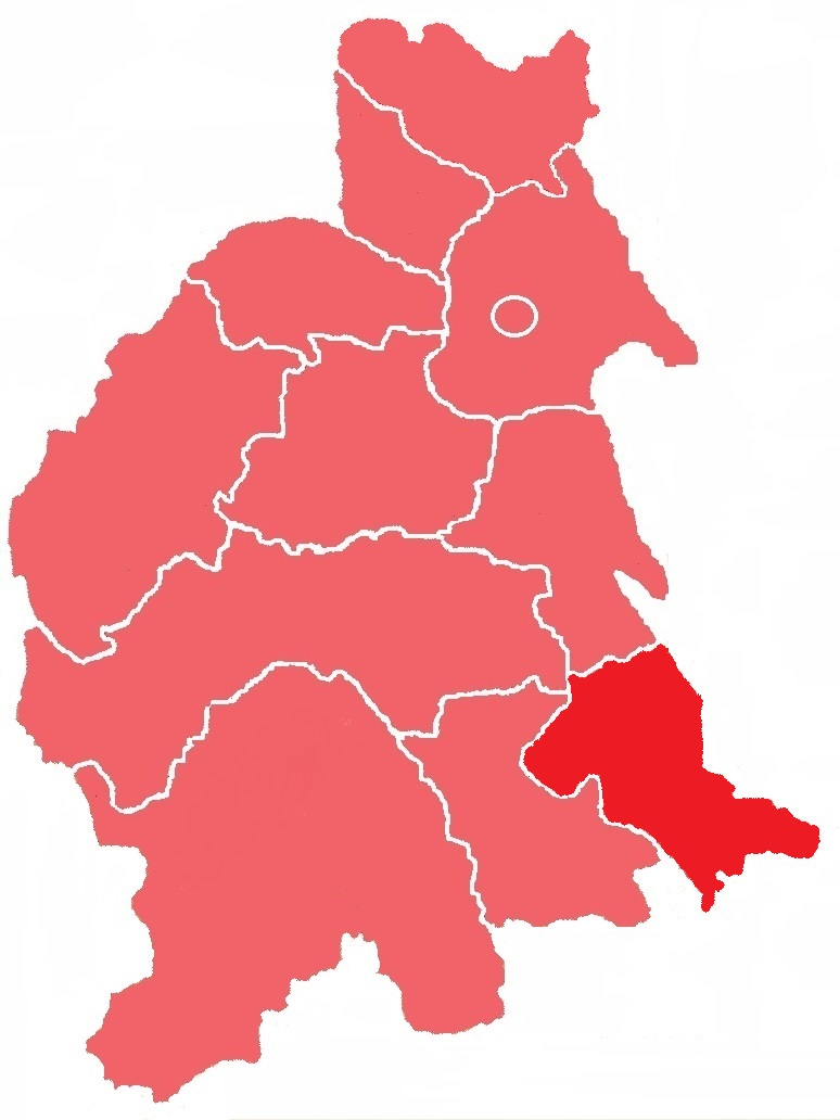 Сучавський повіт